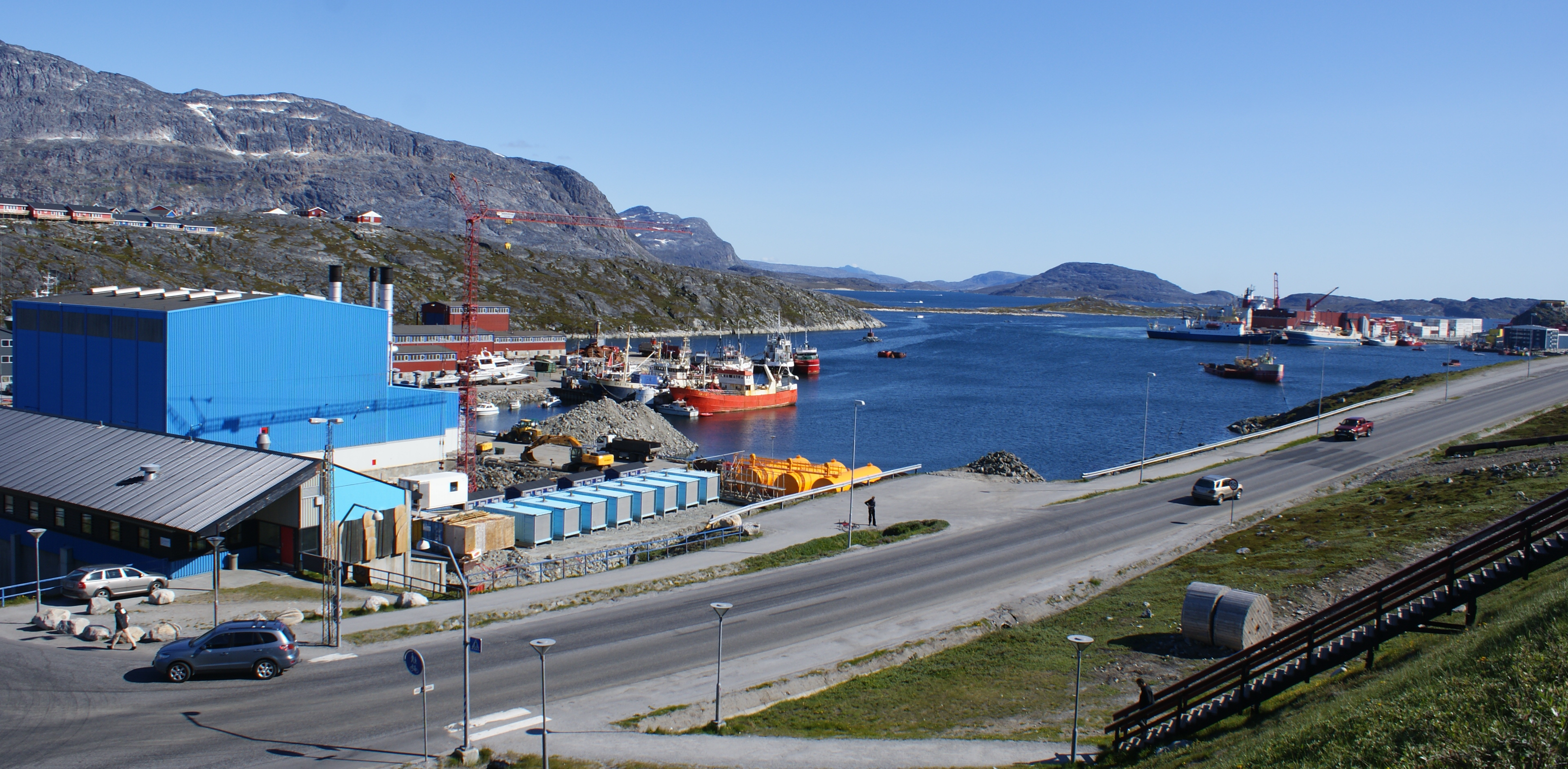 Nuuk Port, Greenland.